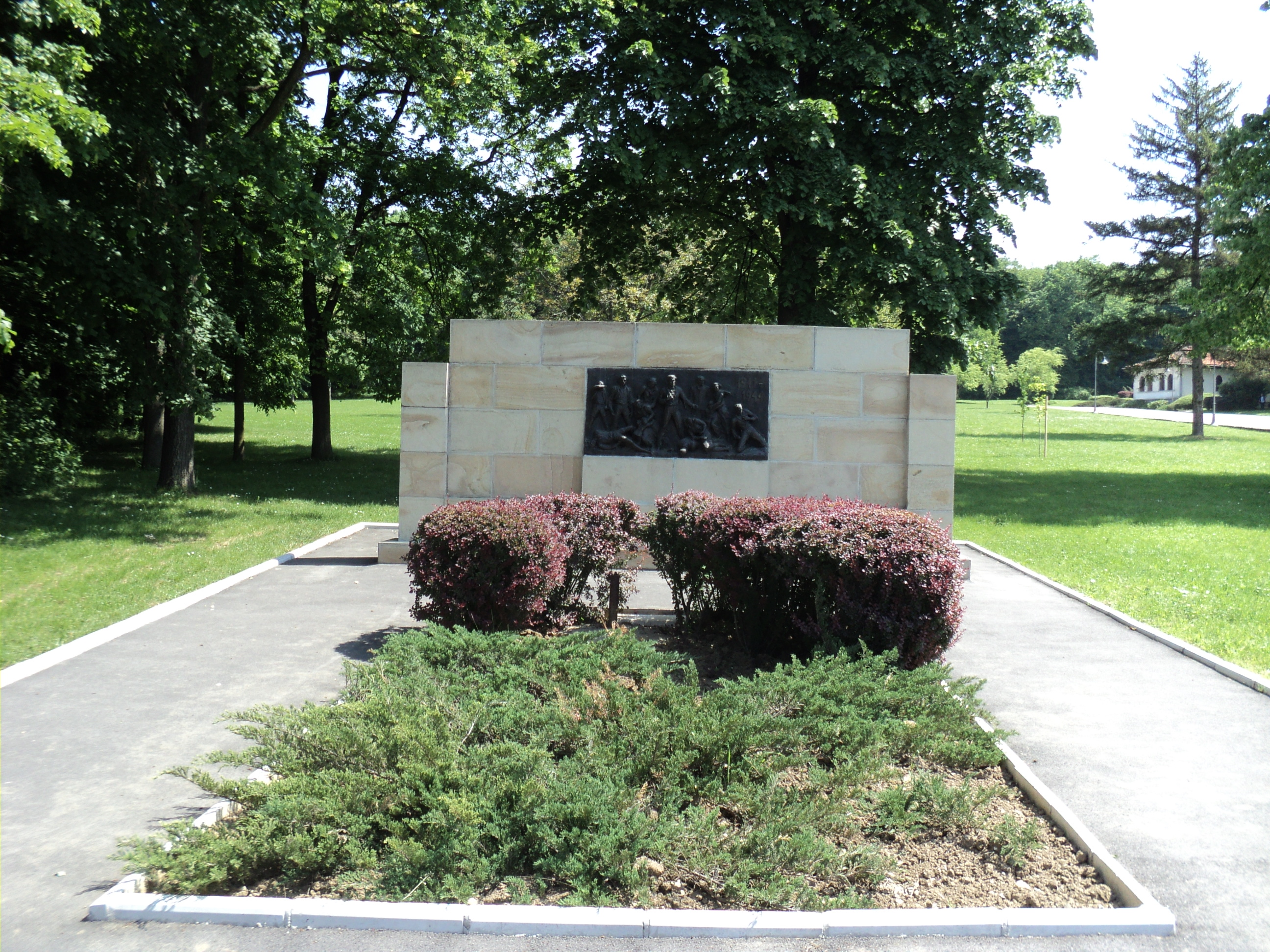 Spomenik streljanima u Jajincima